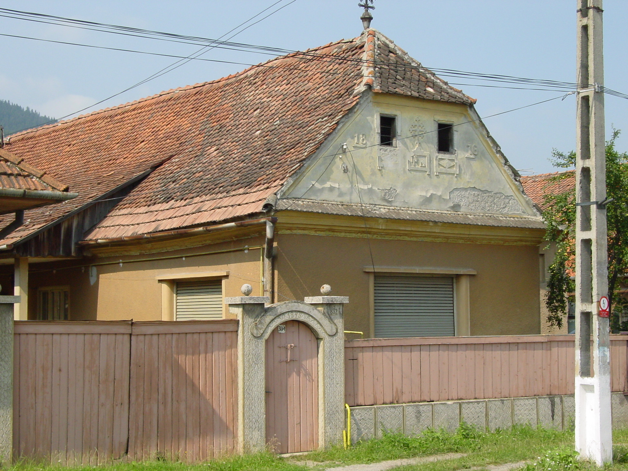 Casă mocănească din 1876 -fatada la strada